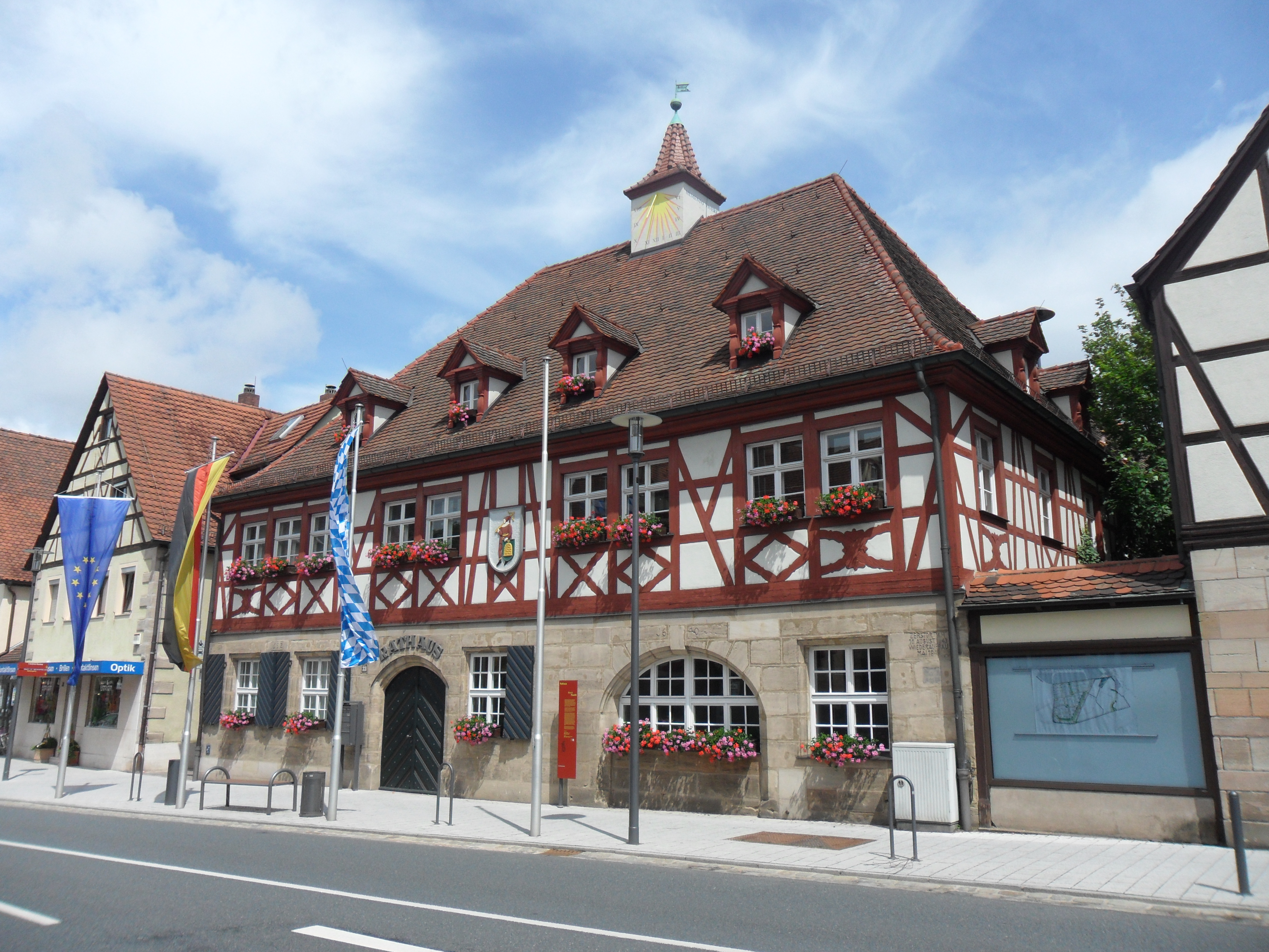 Das Alte Rathaus Feucht in der Hauptstraße